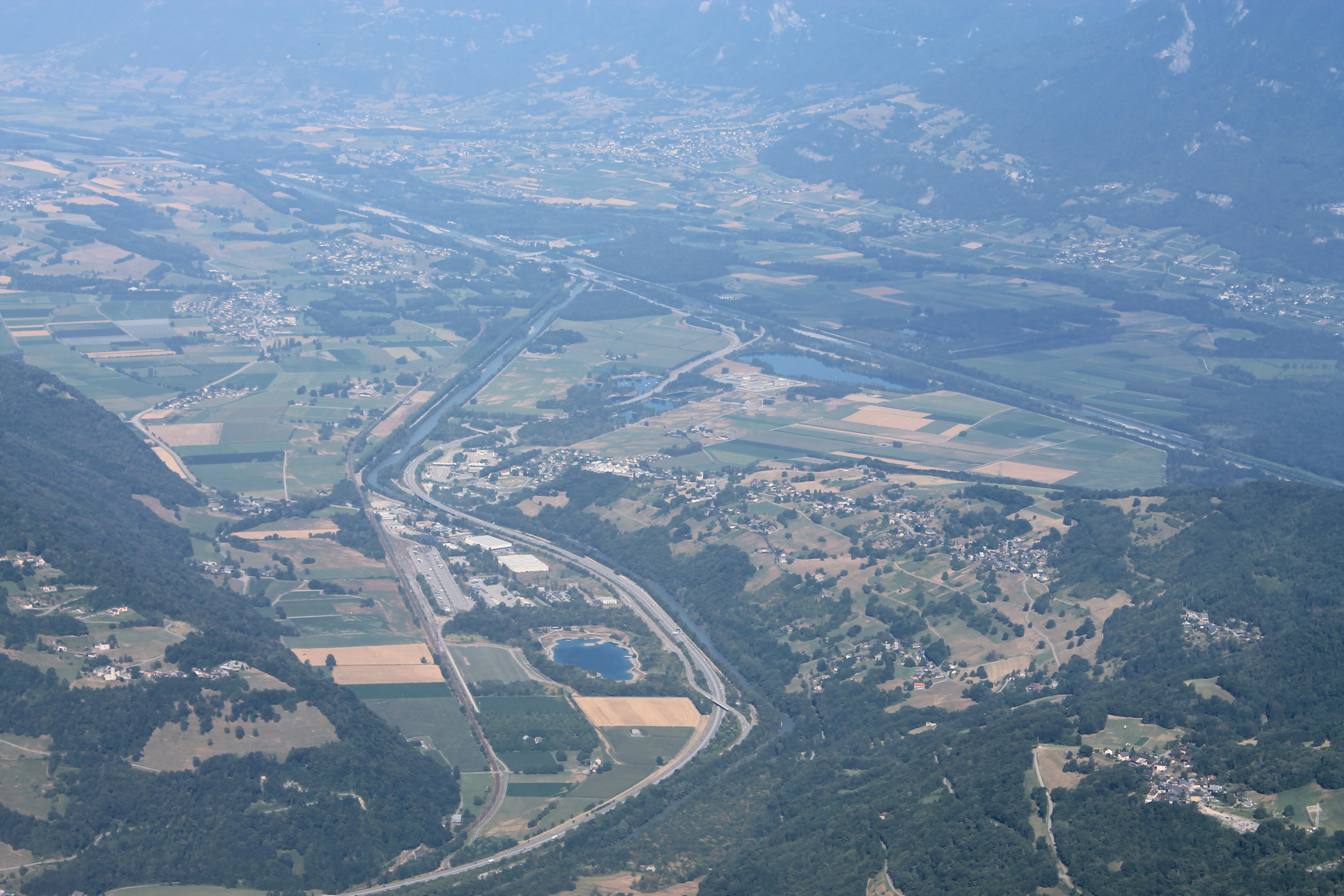 Basse Maurienne et Aiton depuis le Char de la Turche